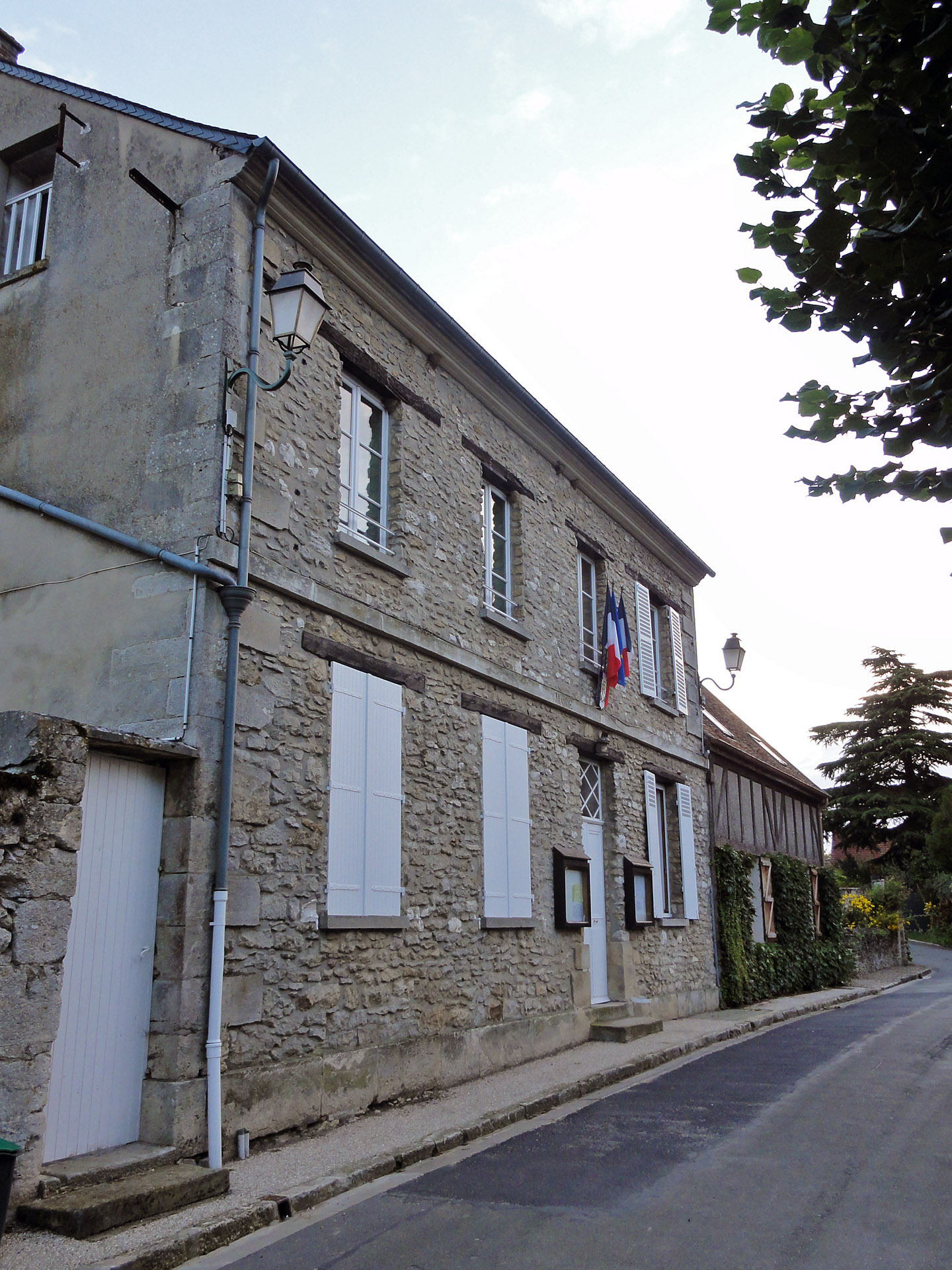 Mairie de Chérence, Val-d'Oise, France.